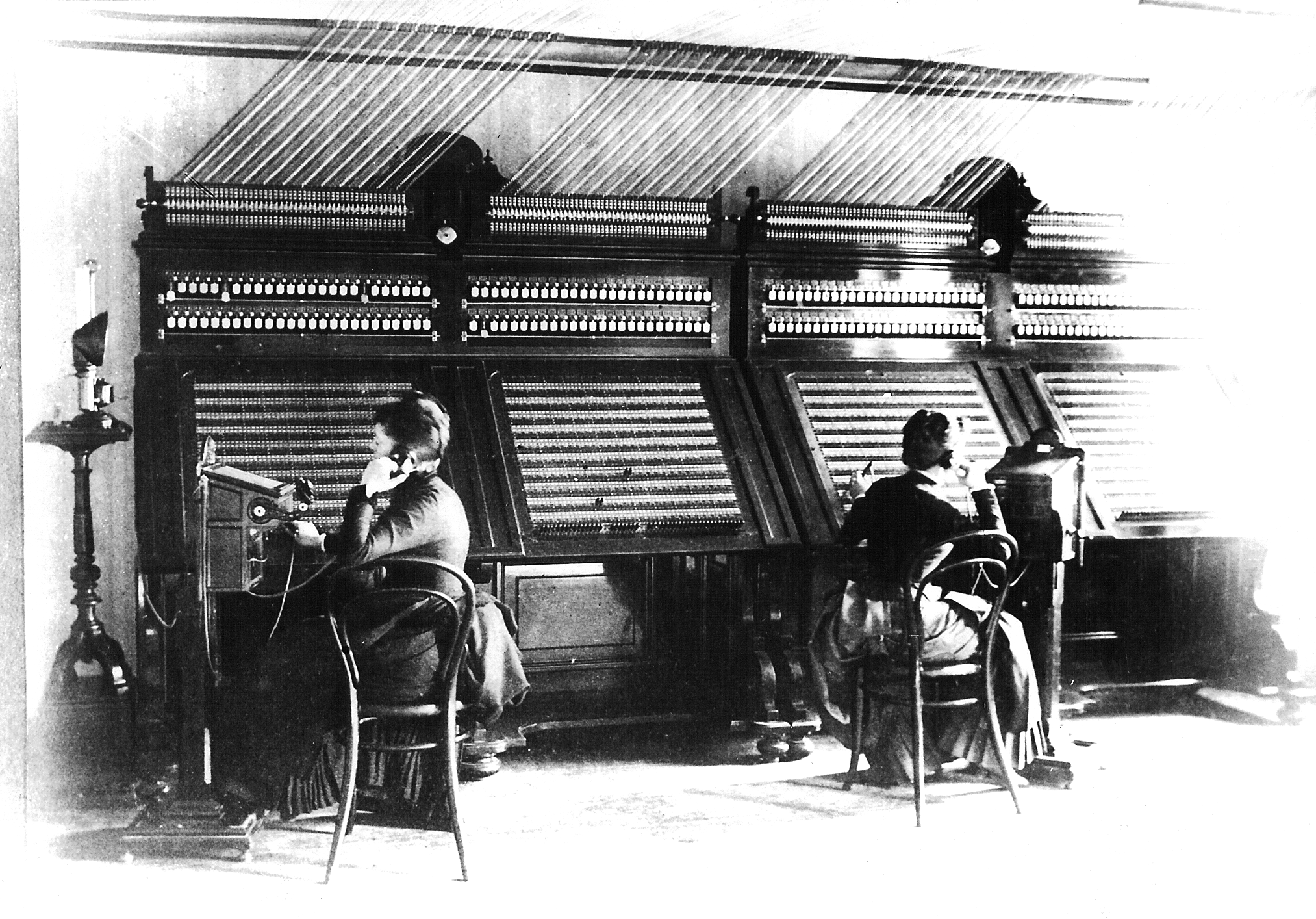 Telefonzentrale Friedrichstraße in Wien, ca. 1885